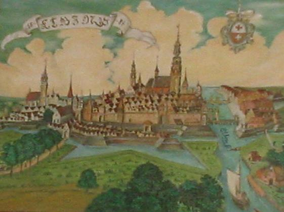 Elblag vesting, foto van schilderij, 2005